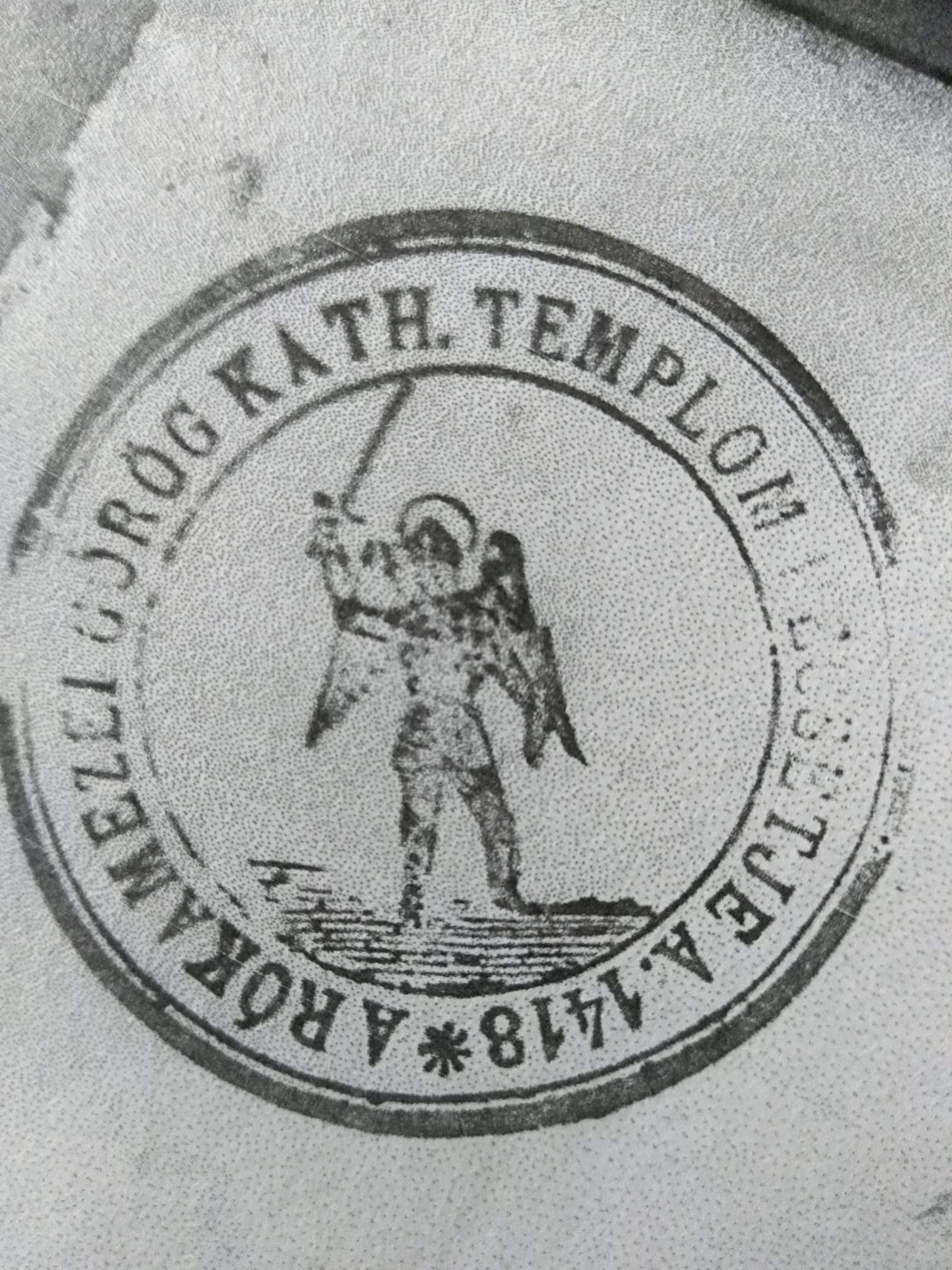 печатка